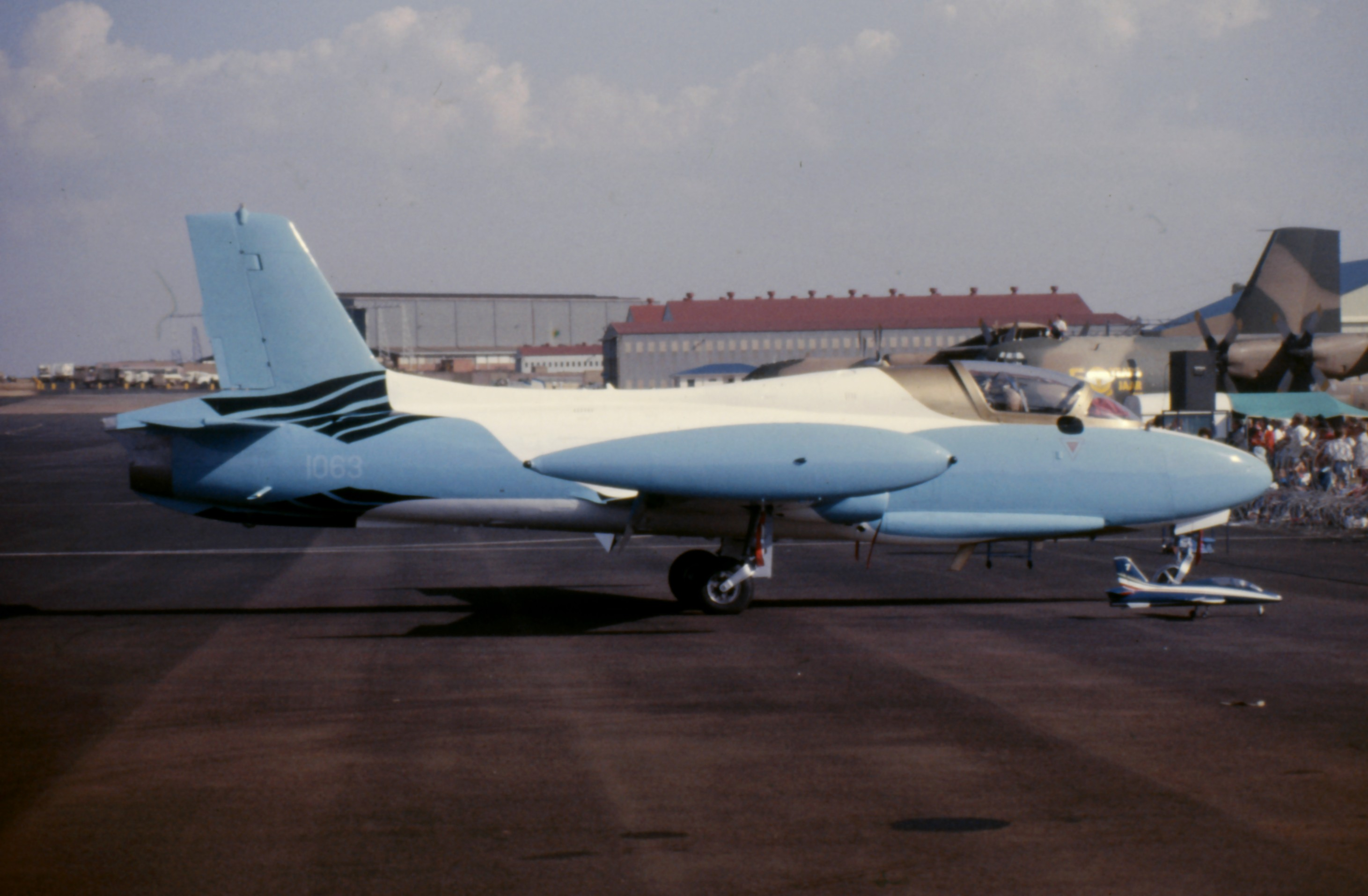 Impala Mk II no. 1063 in Gannet (Malgas) livery at AFB Swartkop